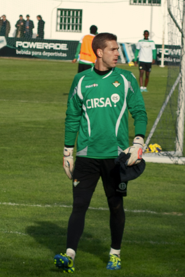 Adrián San Miguel, futbolista. Ciudad deportiva del Real Betis